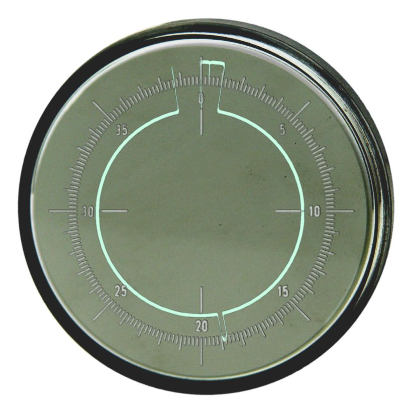 L’affichage, ou indicateur, de type J est parfois appelé aussi un écran à balayage circulaire. Il utilise une déviation modulée du flux d’électron vers l’écran cathodique similaire à celle du type A. La différence avec ce dernier est qu’au lieu d’utiliser une déviation linéaire, qui donne un axe gauche-droite pour la distance au radar, le type J utilise une déviation circulaire donnant l’information comme sur un cadran de montre. Cela permet une meilleure résolution de la présentation avec un écran de même grandeur. Le balayage commence au sommet de l’écran par un « blip » du transmetteur appelé « onde canal ». Il se poursuit dans le sens des aiguilles d’une montre et chaque pic indique une cible. La distance de celle-ci est indiquée par la gradation d’arrière-plan.